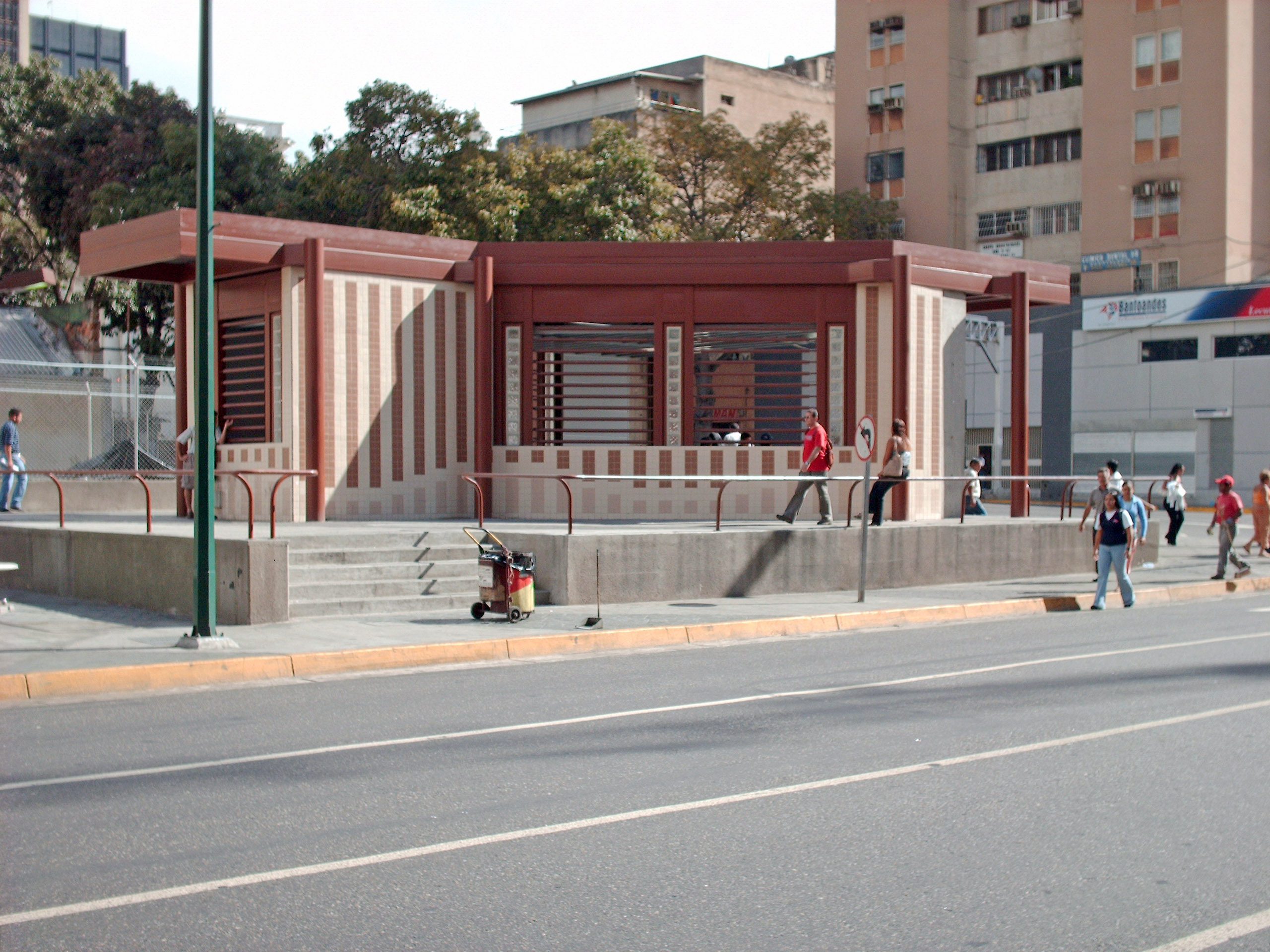 Boca de la Estación Teatros del Metro de Caracas Linea 4